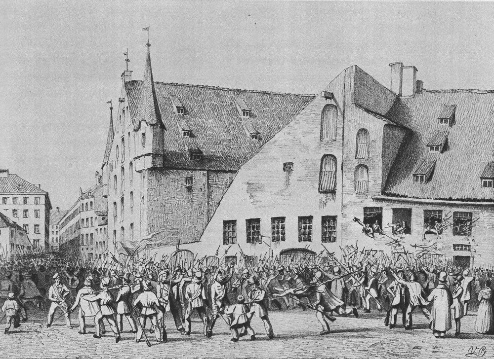 Erstürmung des bürgerlichen Zeughauses am Jakobsplatz im Revolutionsjahr 1848